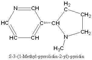 Strukturformel för nikotin